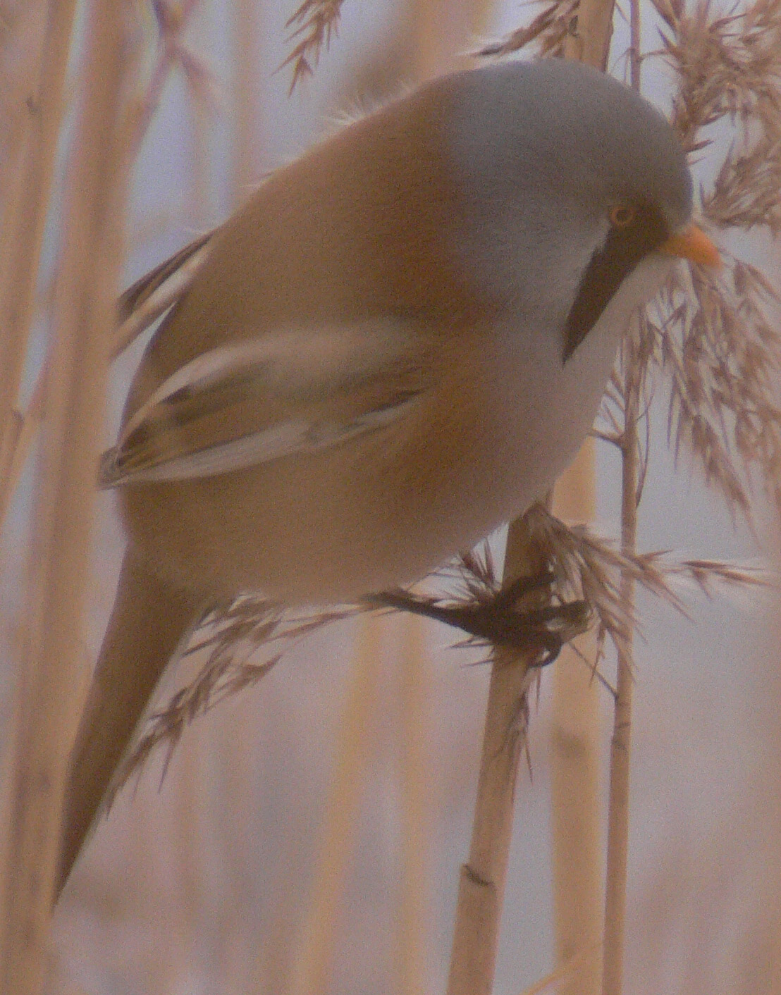 fotografie sýkořice vousaté